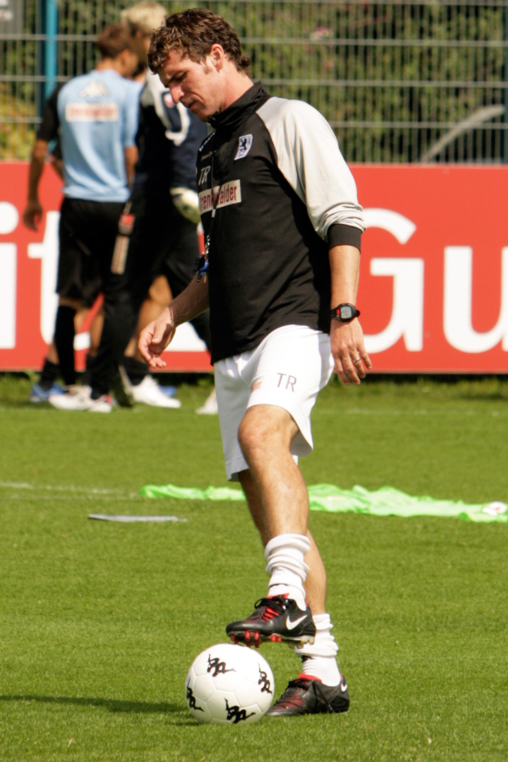 Training 1860 Munich, Grünwalder str.